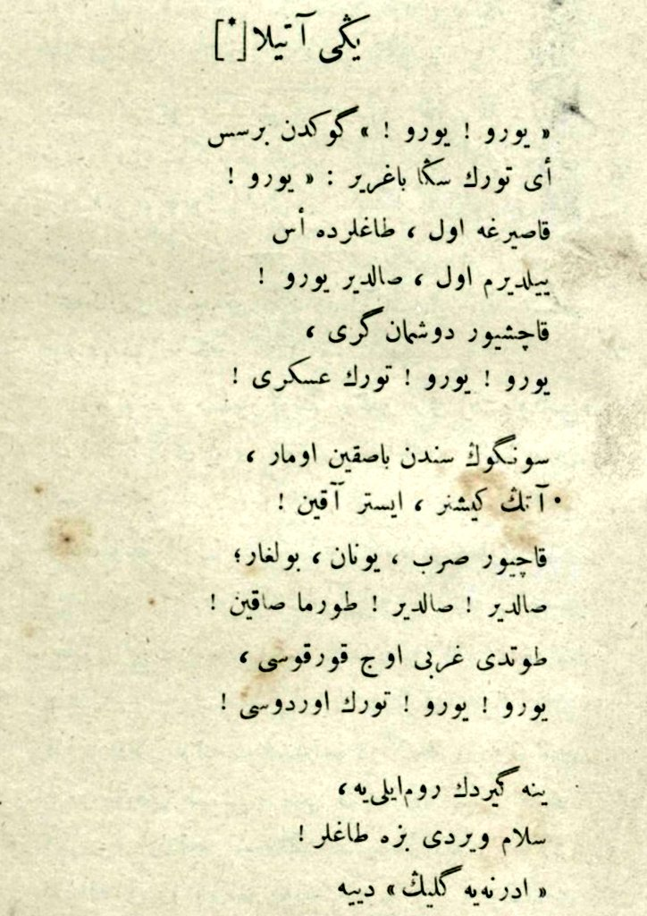 Ziya Gökalp'in 17 Temmuz 1913 tarihinde Enver Paşa için yazdığı "Yeni Atilla" şiiri